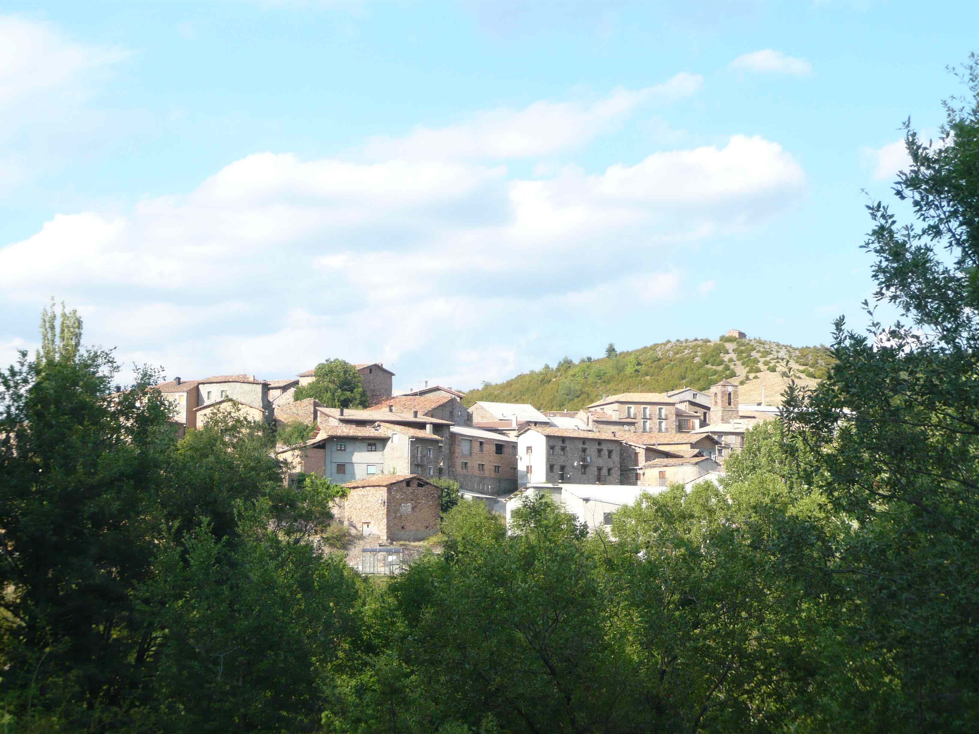 Vista de Bonansa, Aragón, España.